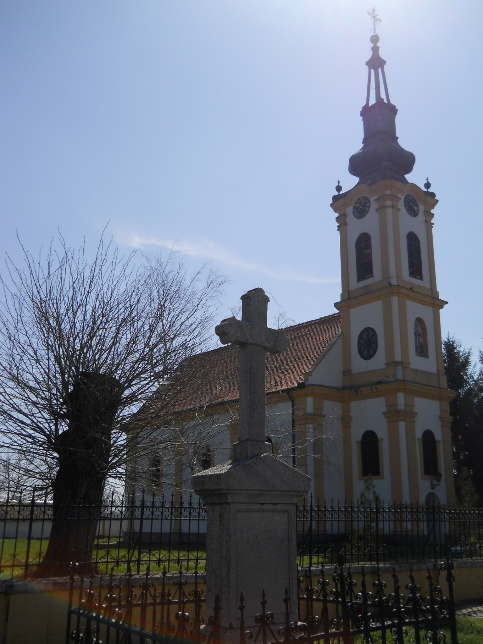 Kereked/Krčedin - ortodox templom és kereszt